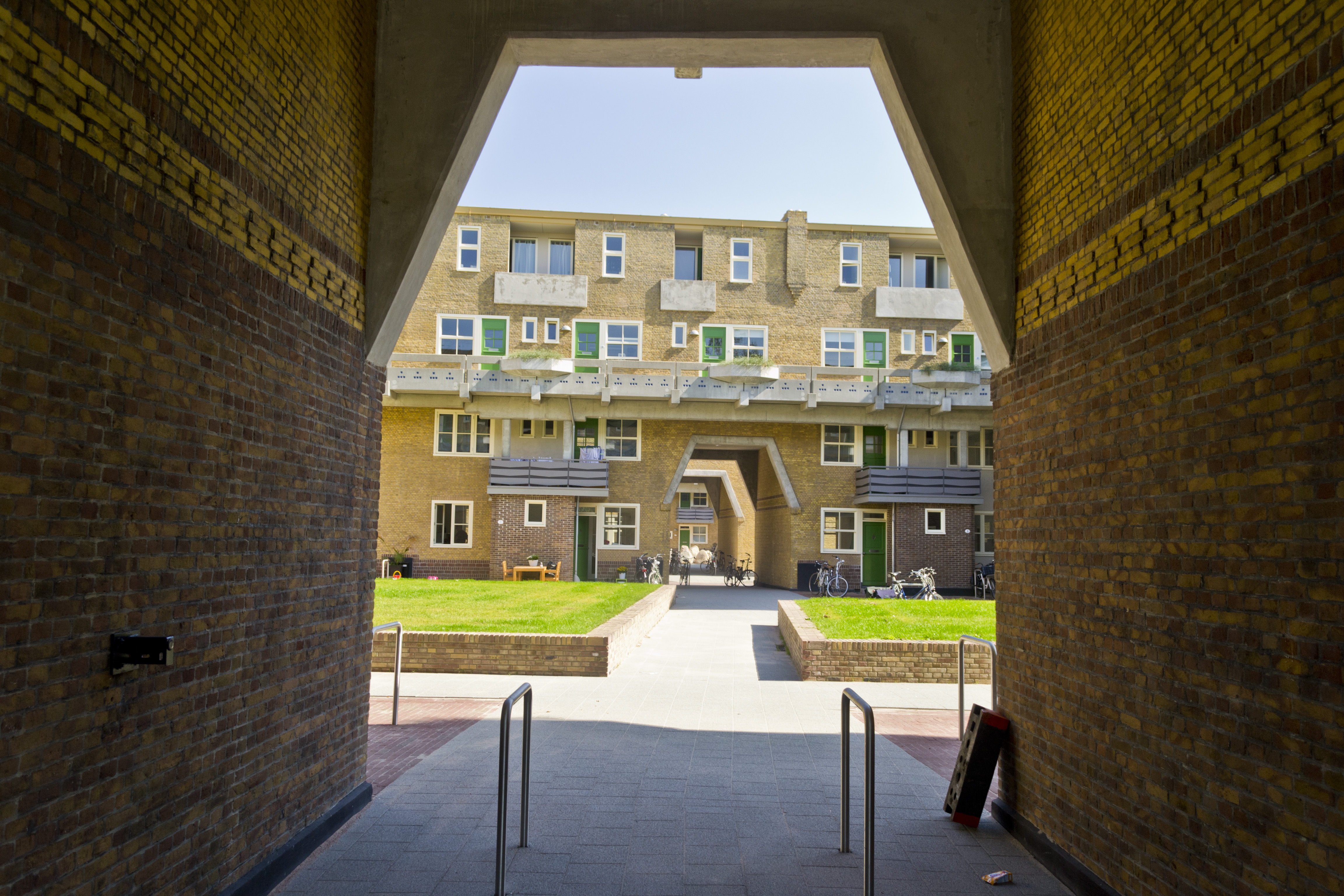 Open Monumentendag 8 september 2012